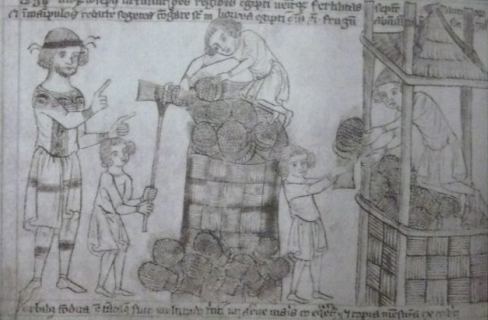 Velislavova bible